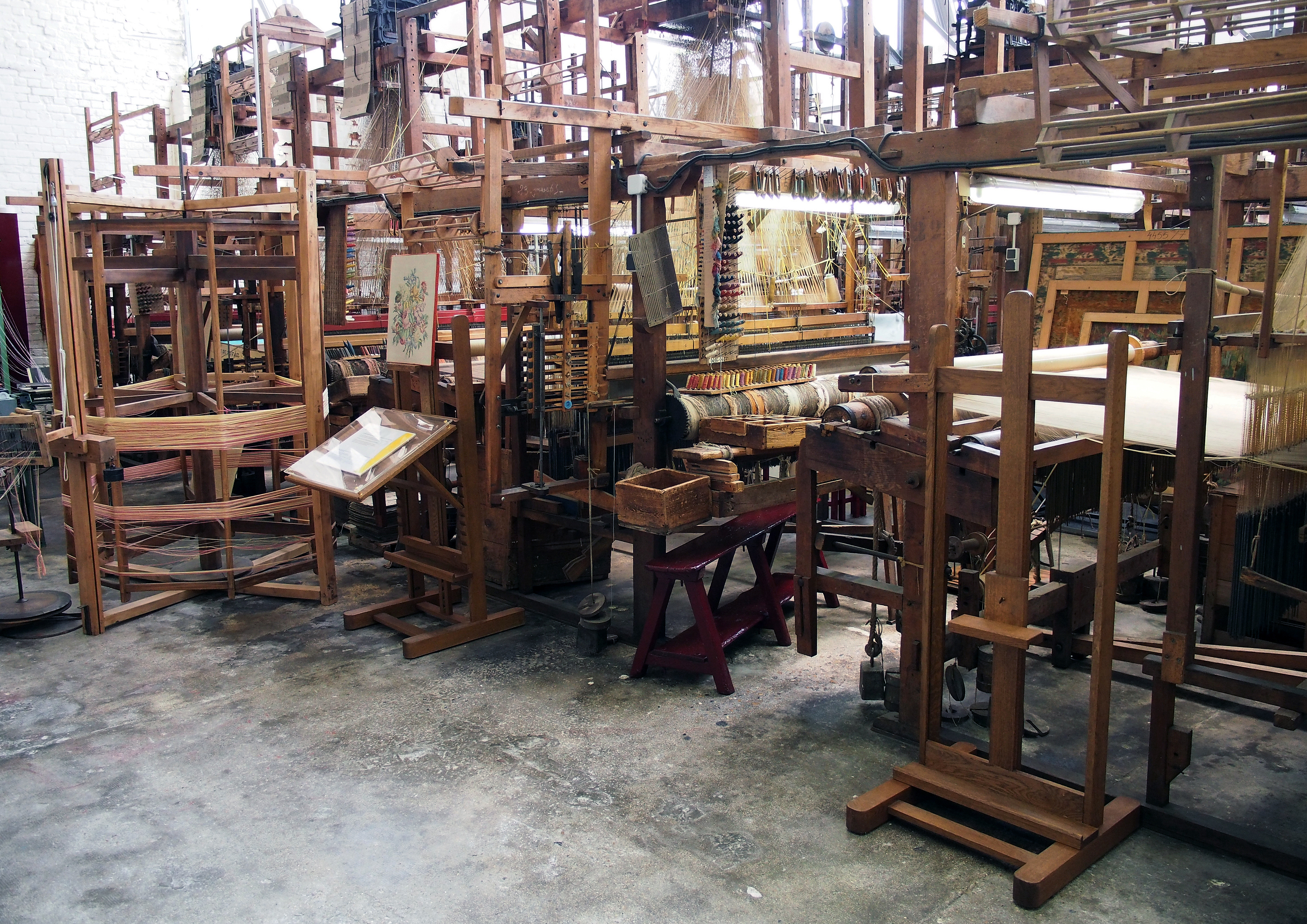 Usine textile La Filandière, 54 rue Roger-Salengro (InscritClassé, 21 février 199724 novembre 1997)